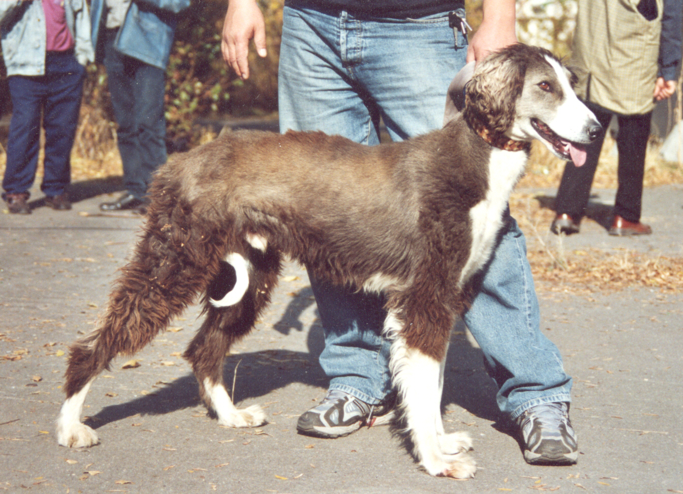 Taigan (Hunderasse, Ursprung Kirgisistan, keine FCI-Anerkennung), Rüde, aufgenommen in Bischkek, Kirgisistan